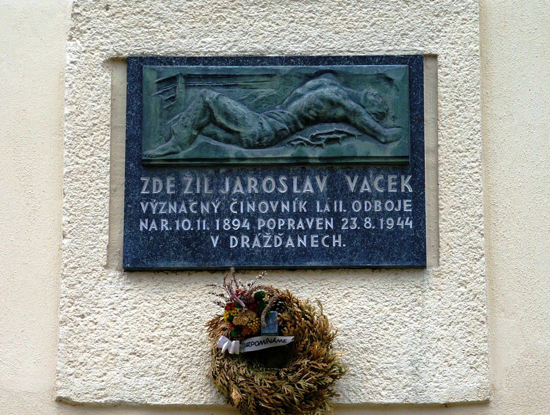 Tábor, pamětní deska Jaroslavu Vackovi (na budově bývalé krajské věznice na náměstí Mikuláše z Husi.)